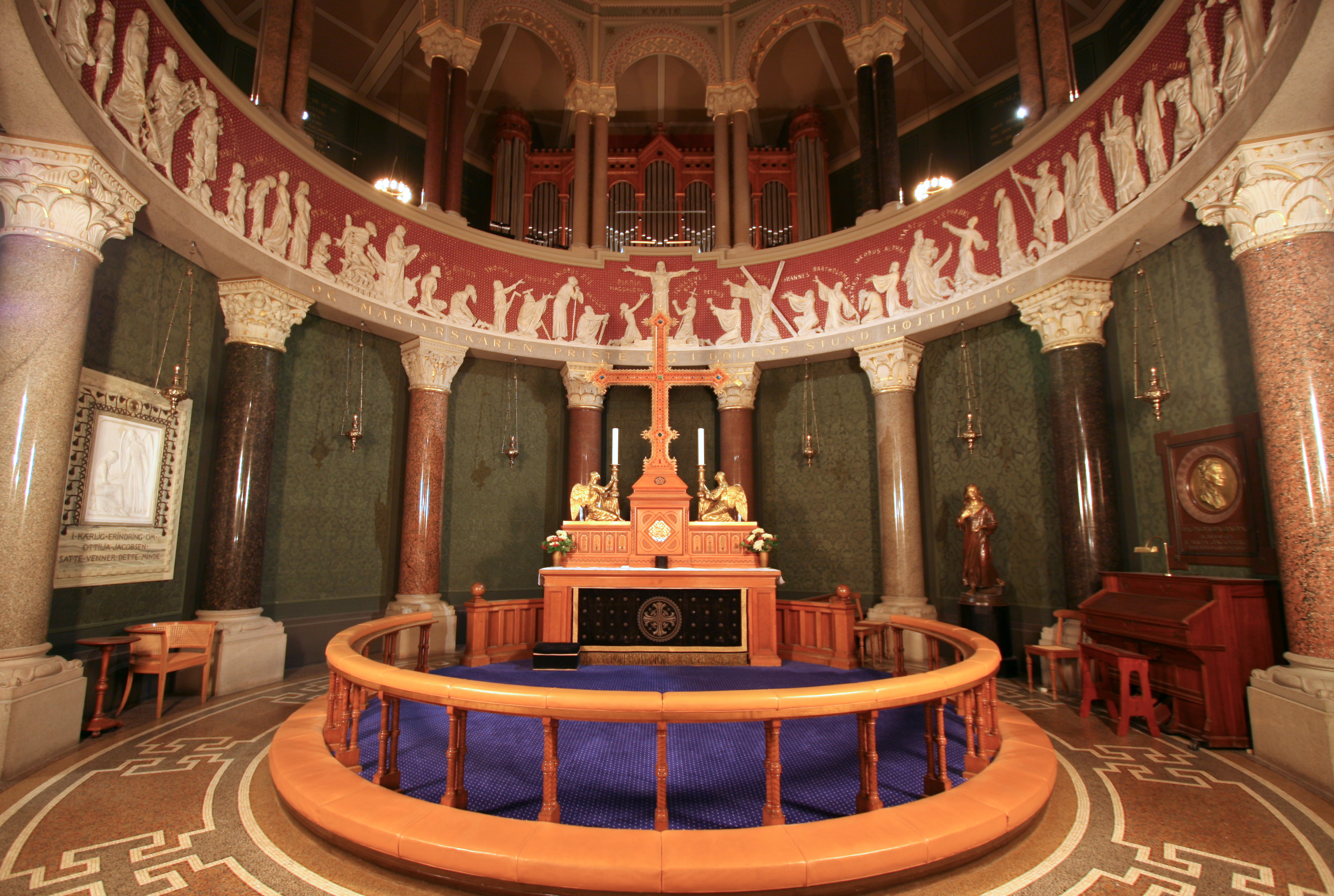 Jesuskirken, Valby, Copenhagen, Denmark Quire.